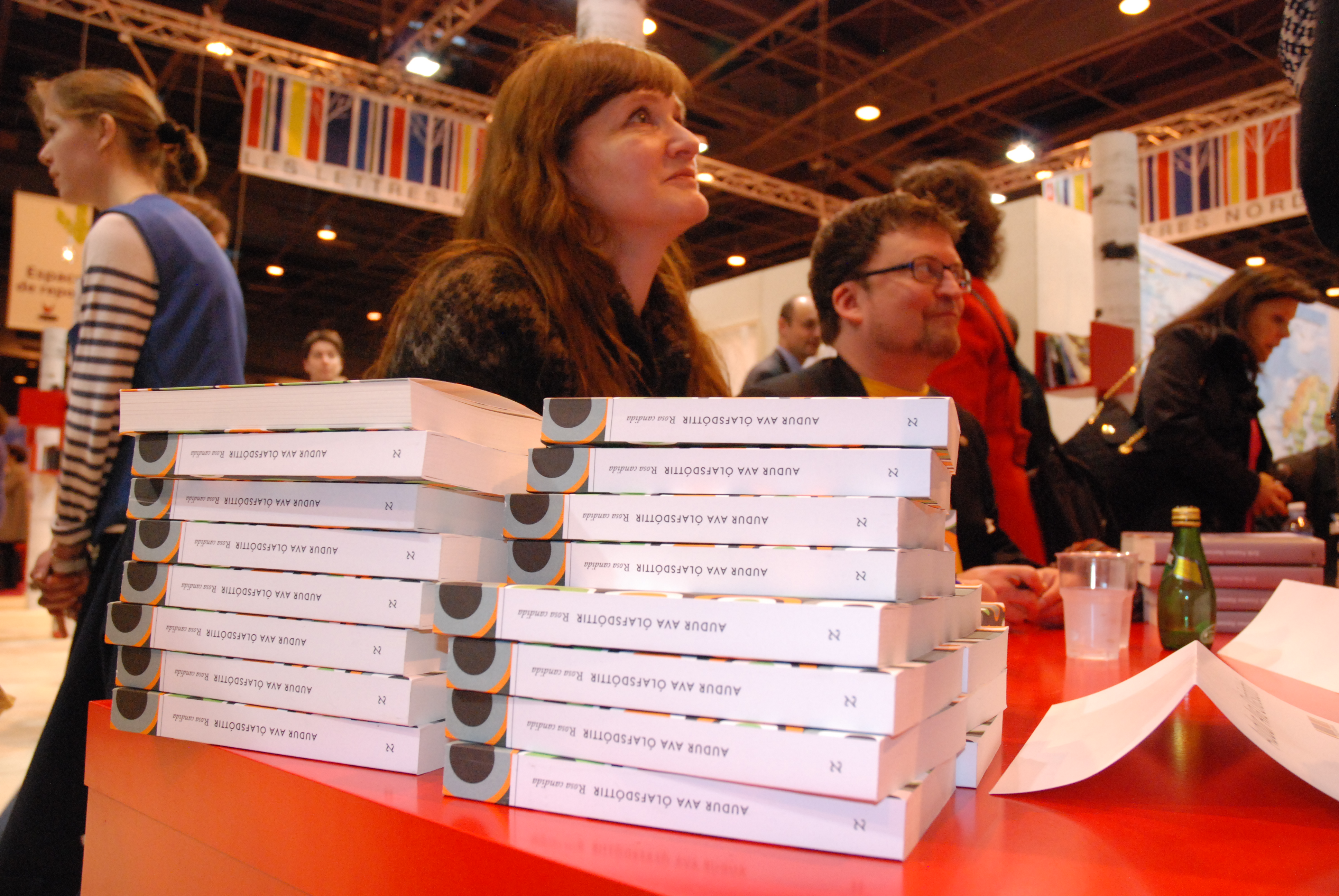 Nordiske forfattere signerer verkene sine i den nordiske paviljongen på den franske bokmessen